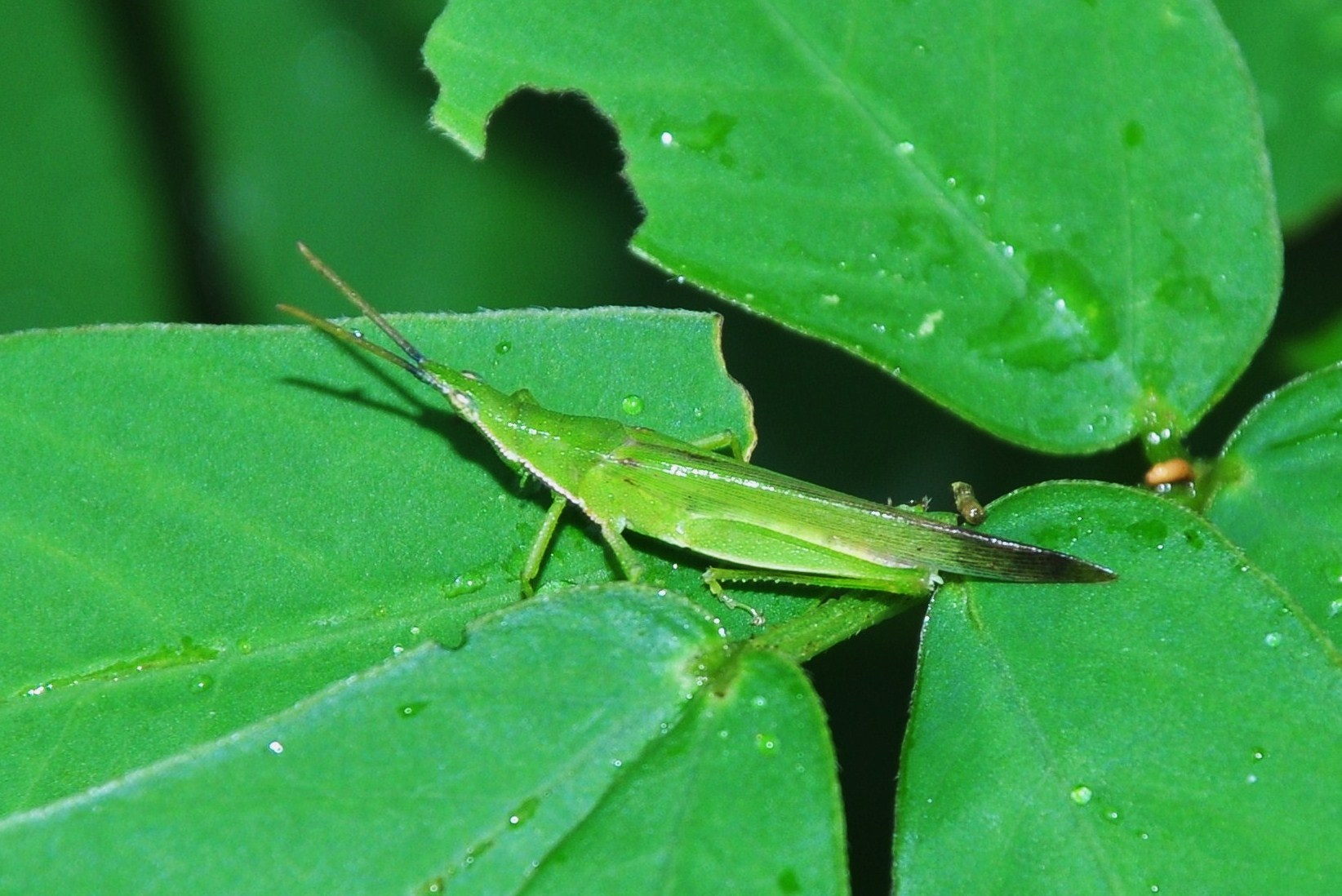 Atractomorpha similis